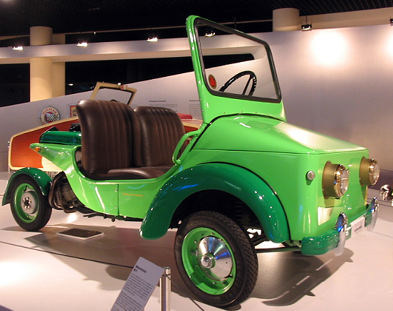 Fotografía digital realizada por p40p o Pablo Alberto Salguero Quiles